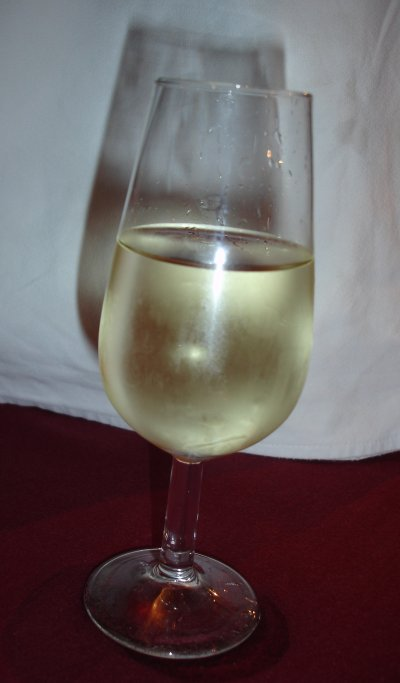 Catavino es la copa en la que se recomienda tomar el Jerez (vino de Jerez de la Frontera, España), también conocido como Sherry o Xeres Catavino is a cup made specially to have Jerez (wine from Jerez de la Frontera, Spain), also know as Sherry or Xeres